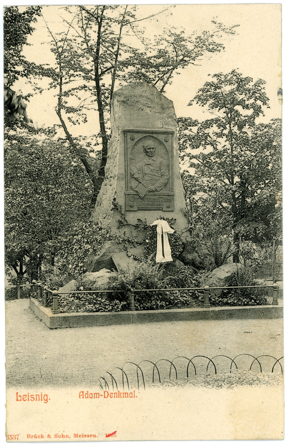 Leisnig; Adam - Denkmal This postcard is from publisher Brück & Sohn in Meißen ( postcard has a unique number 06537 and is available in a higher resolution at the publisher. This images was uploaded in a cooperation project between Wikipedians and the publisher.